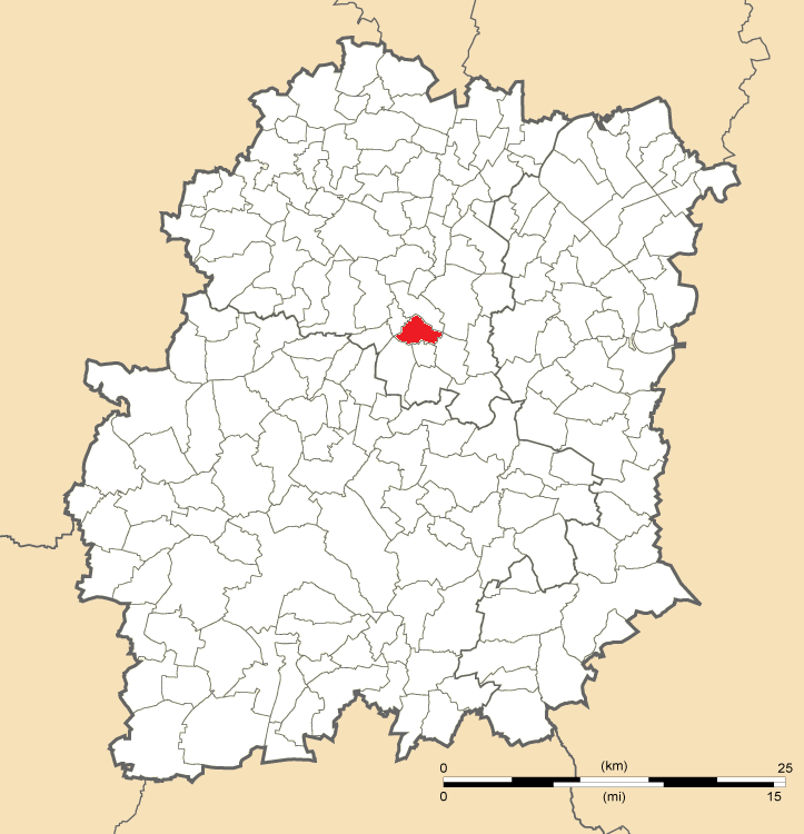 Carte de position de La Norville en Essonne (91)